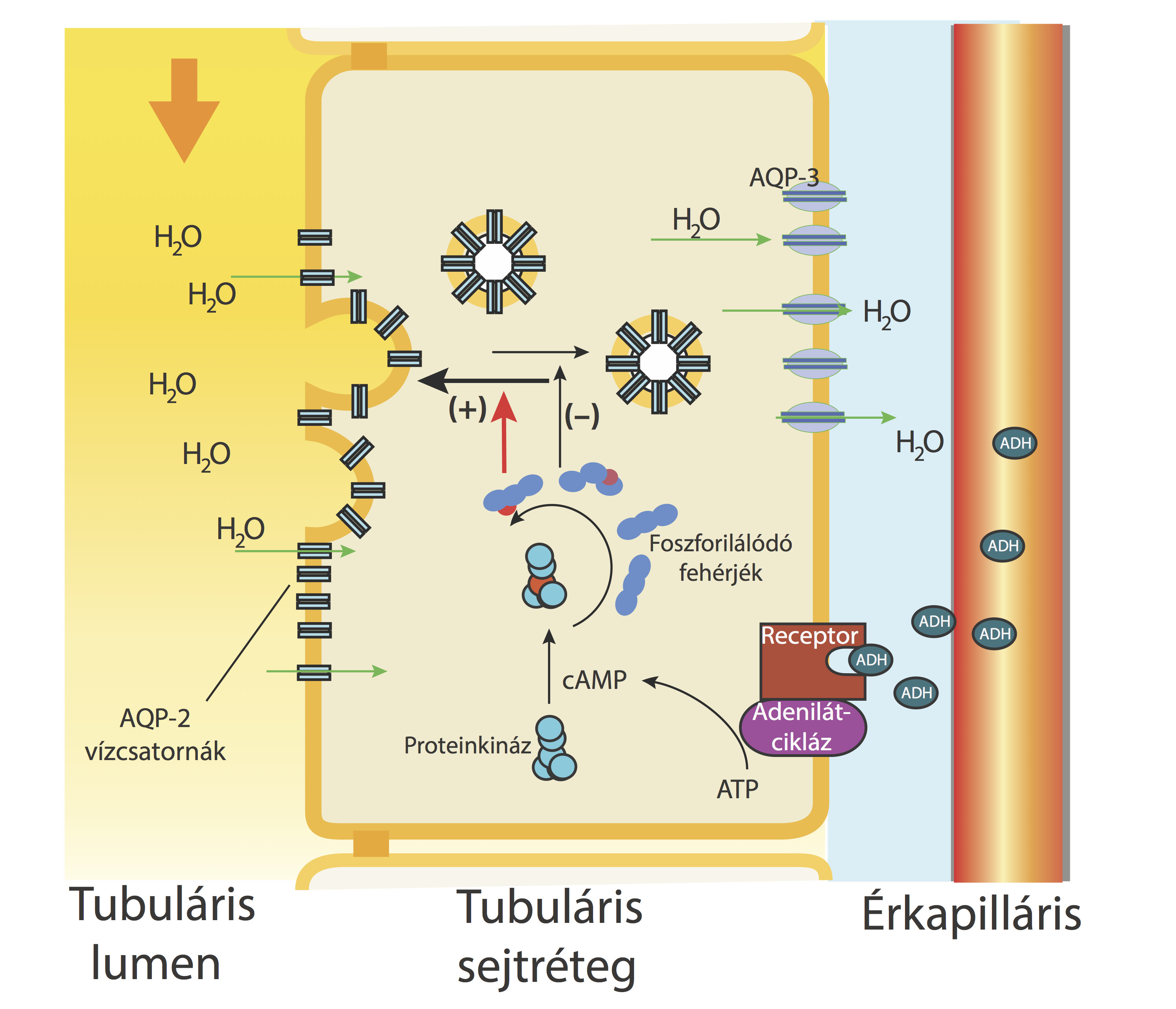 Illusztráció (ADH hatása a nefron vízcsatornáira)